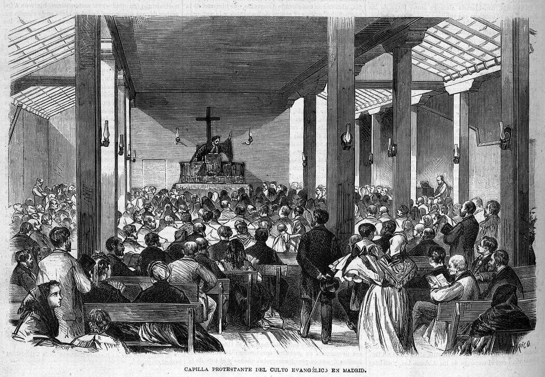 Capilla protestante del culto evangélico en Madrid. Calle de la Madera.